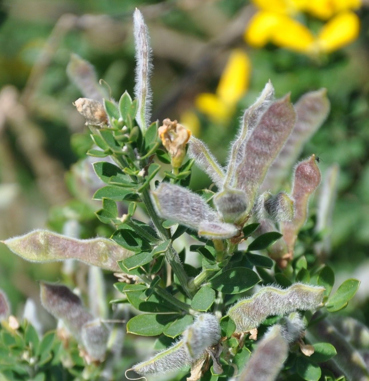 Legumbres de retamilla (Genista monspessulana), Ceuta, España.